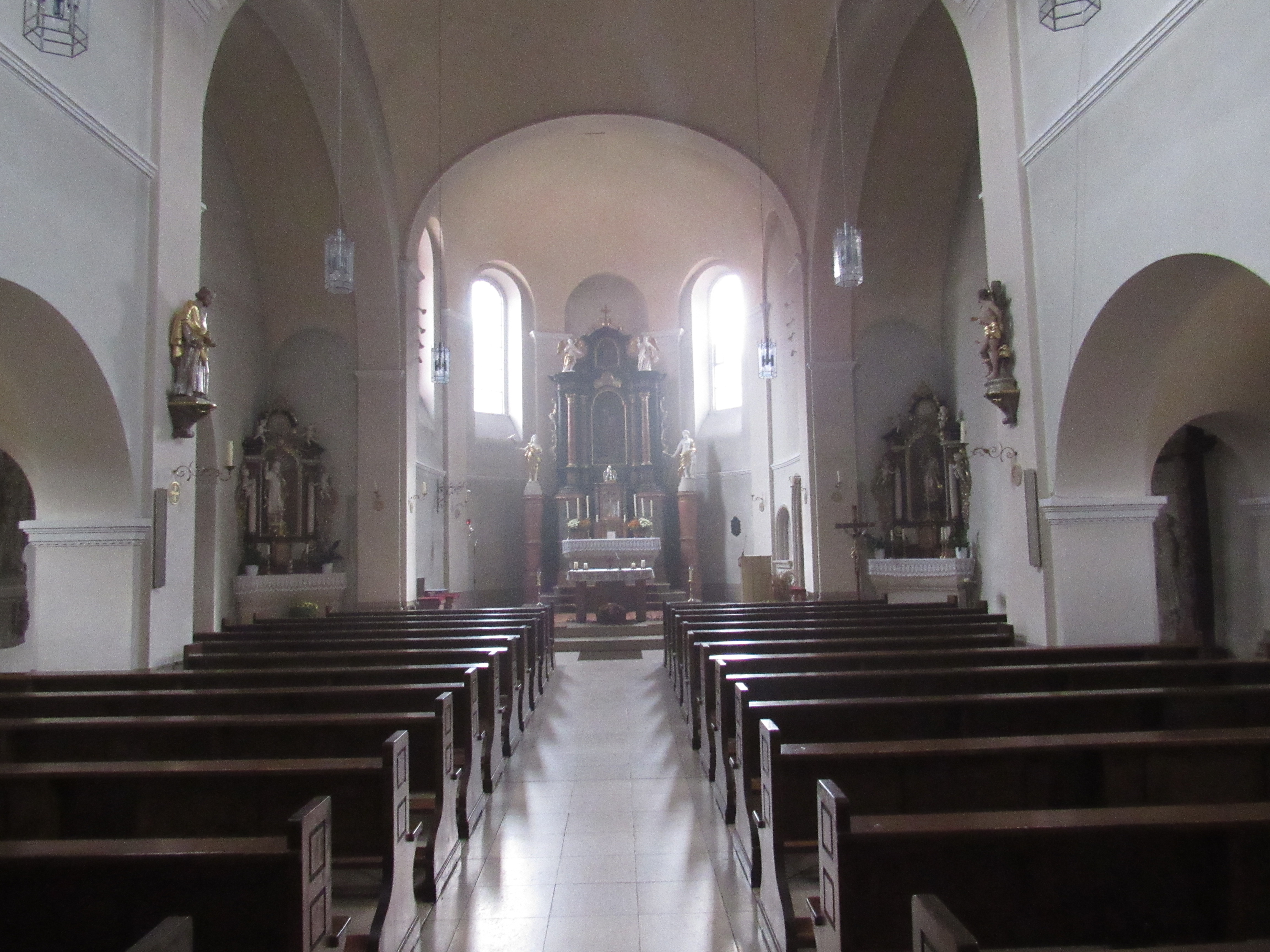 Kirche Untererthal innen